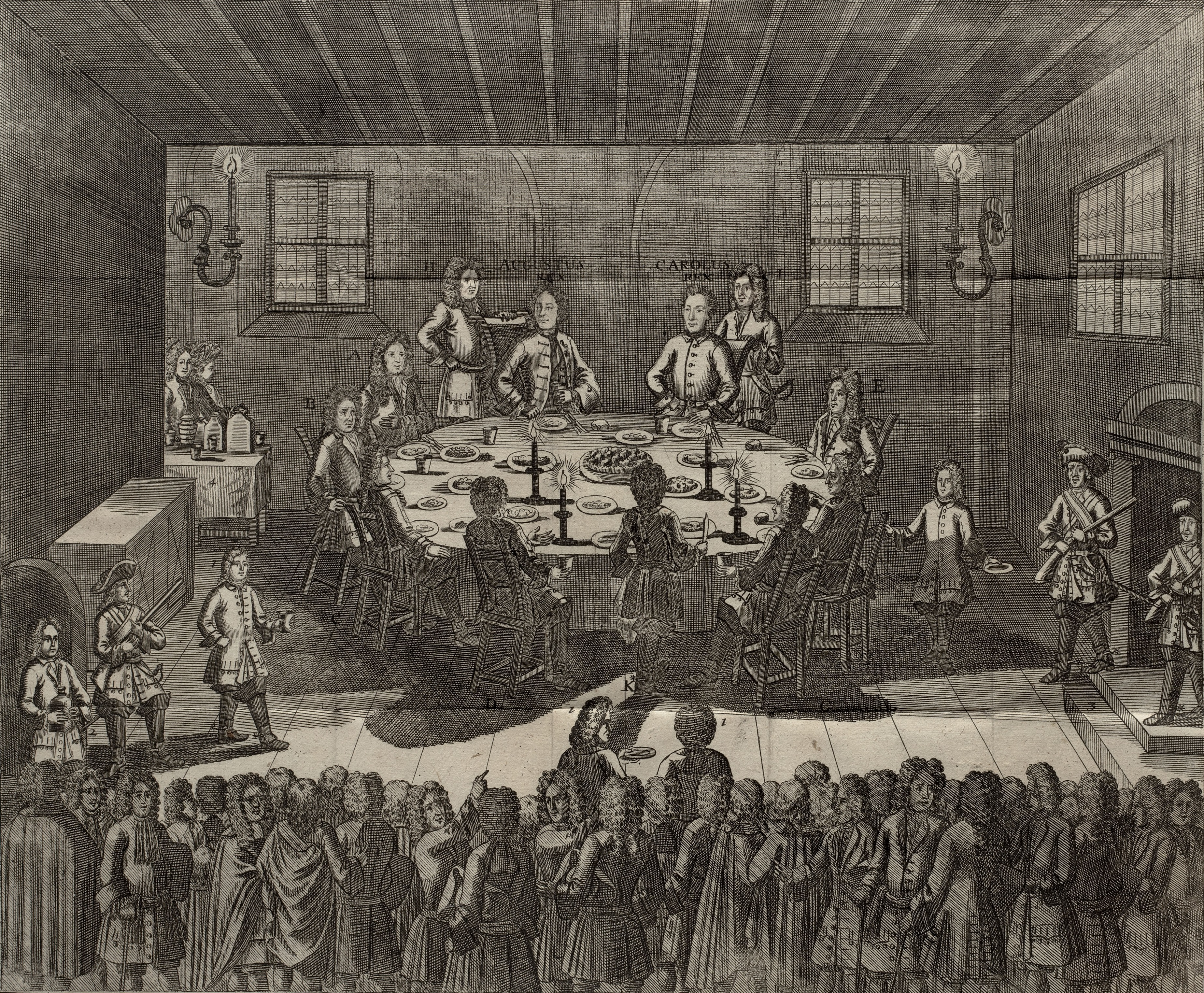 Unbekannter Künstler. Offizielles Mittagessen der Teilnehmer nach der Unterzeichnung des Vertrags von Altranstadt am 7. Dezember 1706. Kupferstich. Datum unbekannt.